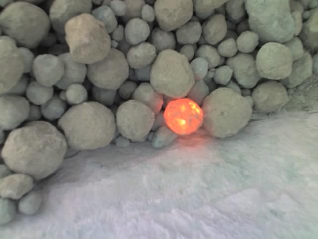 White clinker after kiln exit.